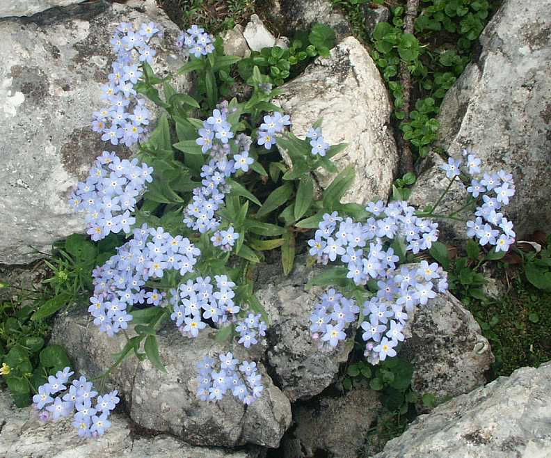 Alpen-Vergissmeinnicht. Fundort: Nähe Liezener Hütte, Wörschach, Österreich